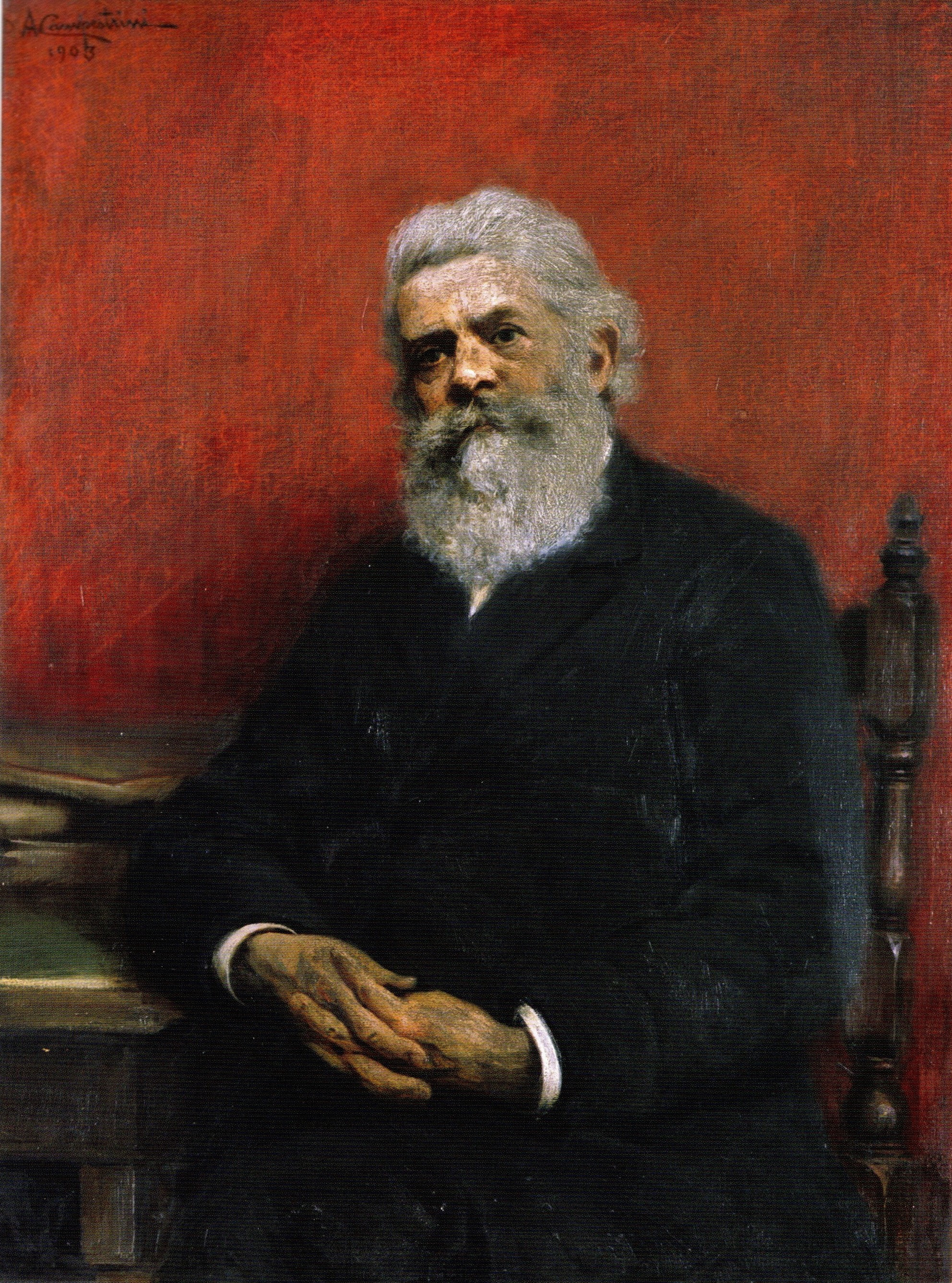 Oli on canvas. Alcide Davide Campestrini